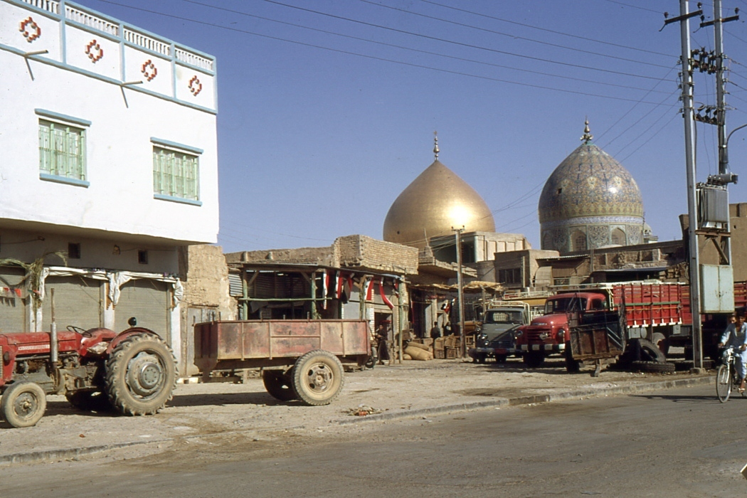 Les dômes de Samarra en 1970